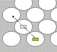 Lasca (juego) posición 1